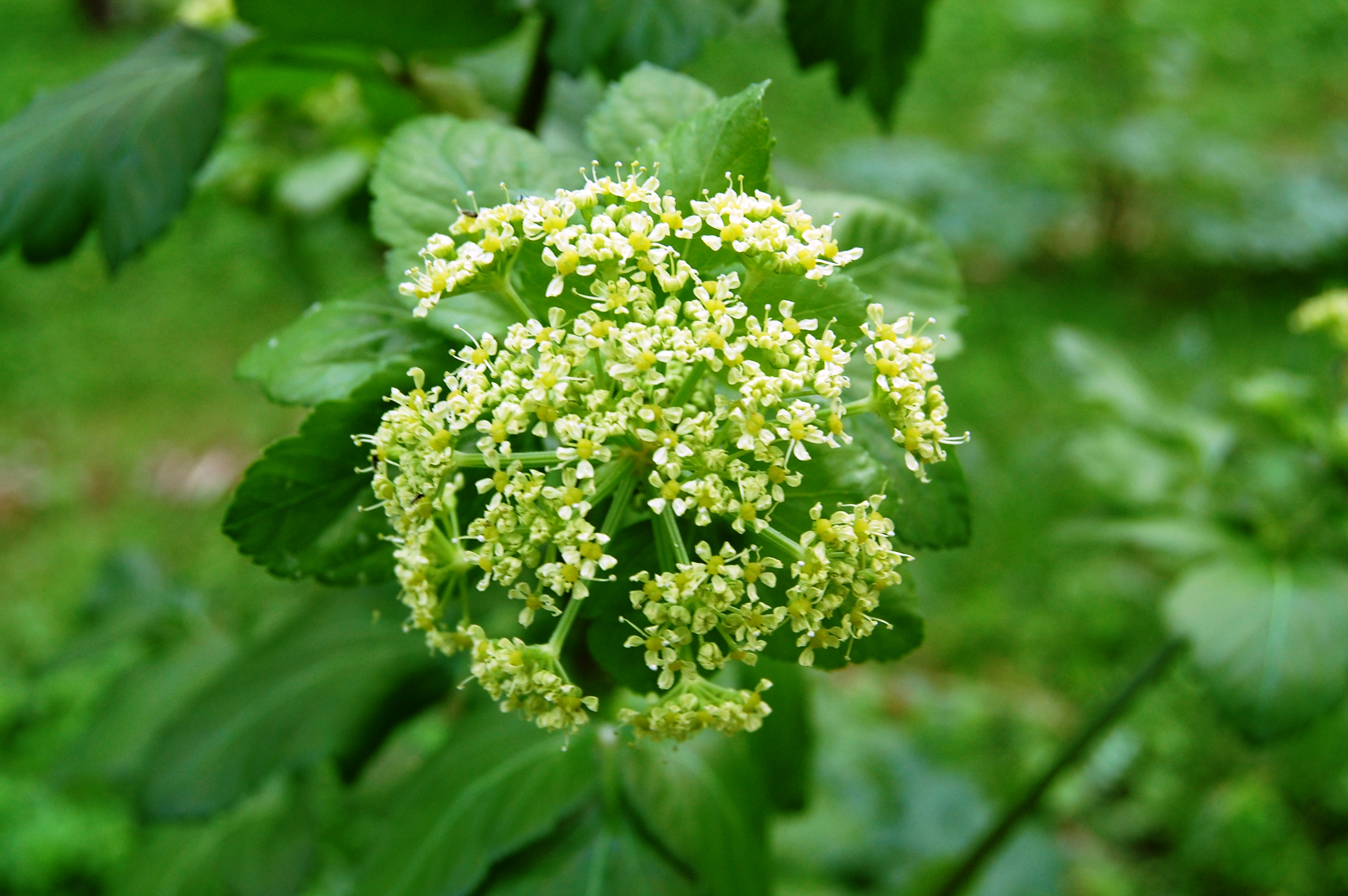 Smyrnium olusatrum Riserva naturale Monte Pellegrino